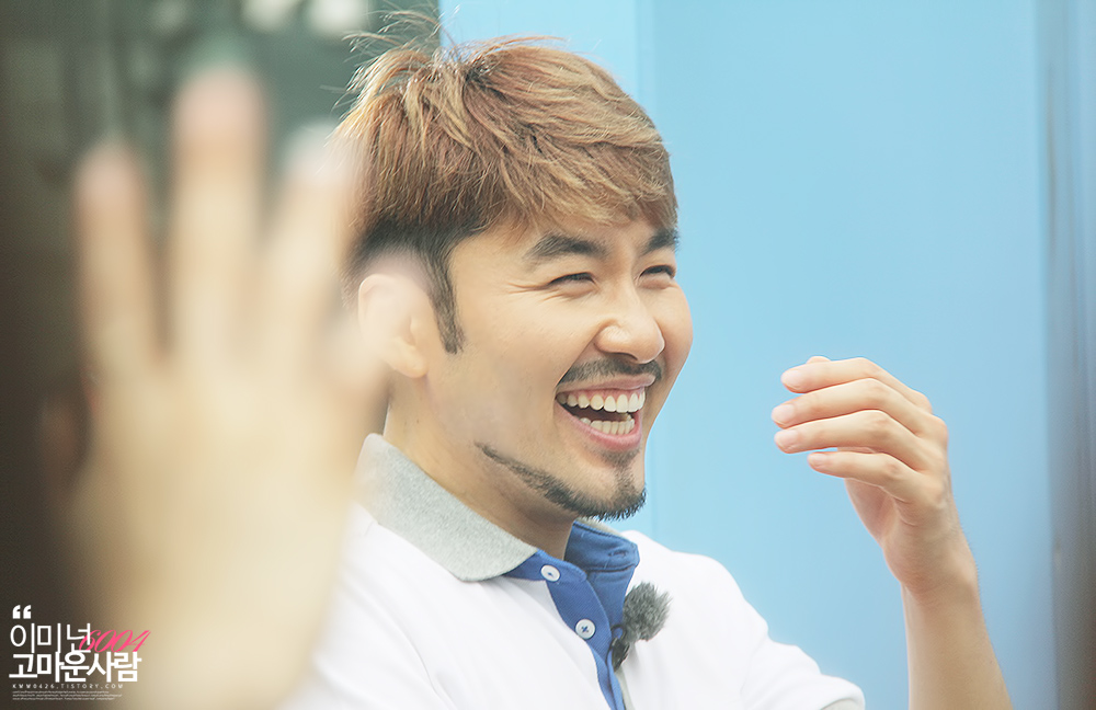 2014 무한도전 팥빙수 이벤트